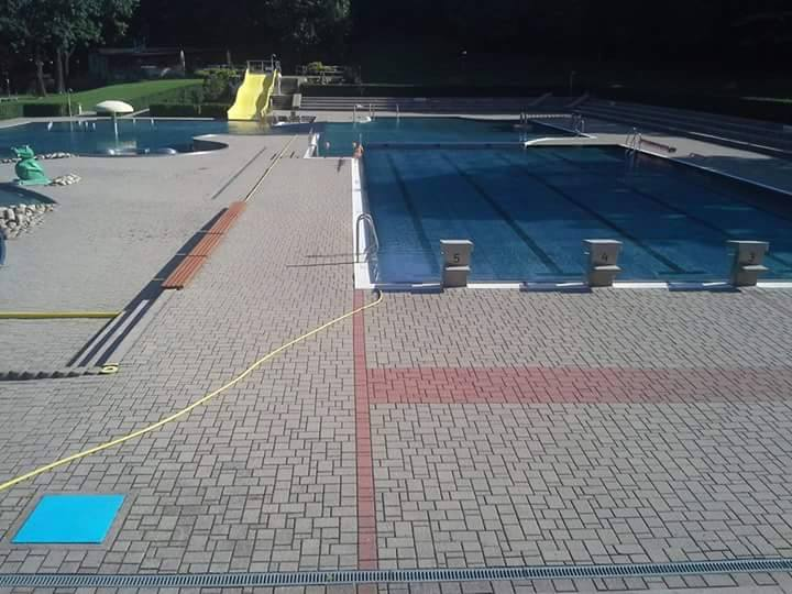 Zrekonstruované koupaliště